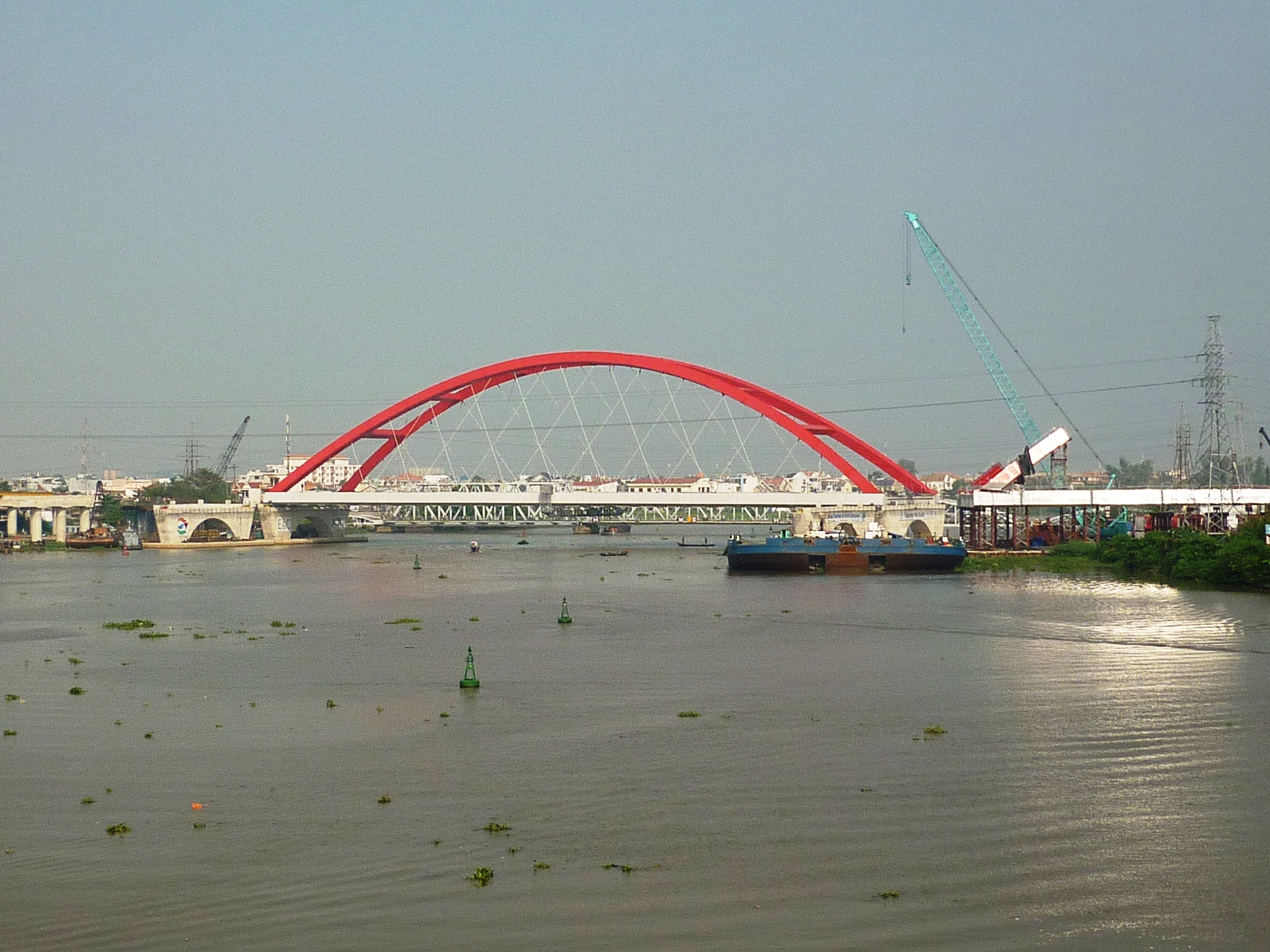 Nhịp cầu vòm thép Nielsen ở cầu Bình Lợi 2